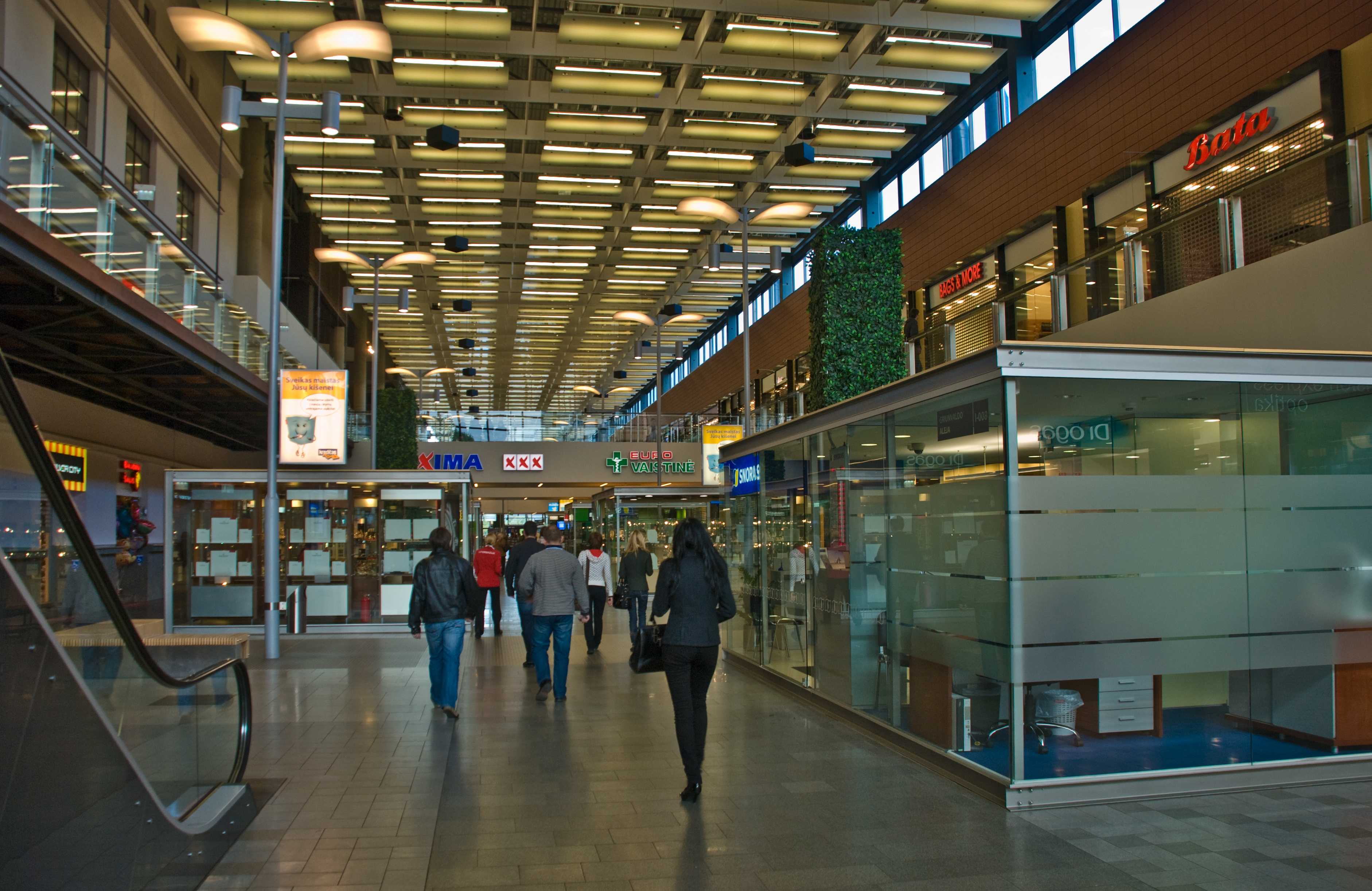 Akropolis Mall, Kaunas, Lithuania, 12 Sept. 2008